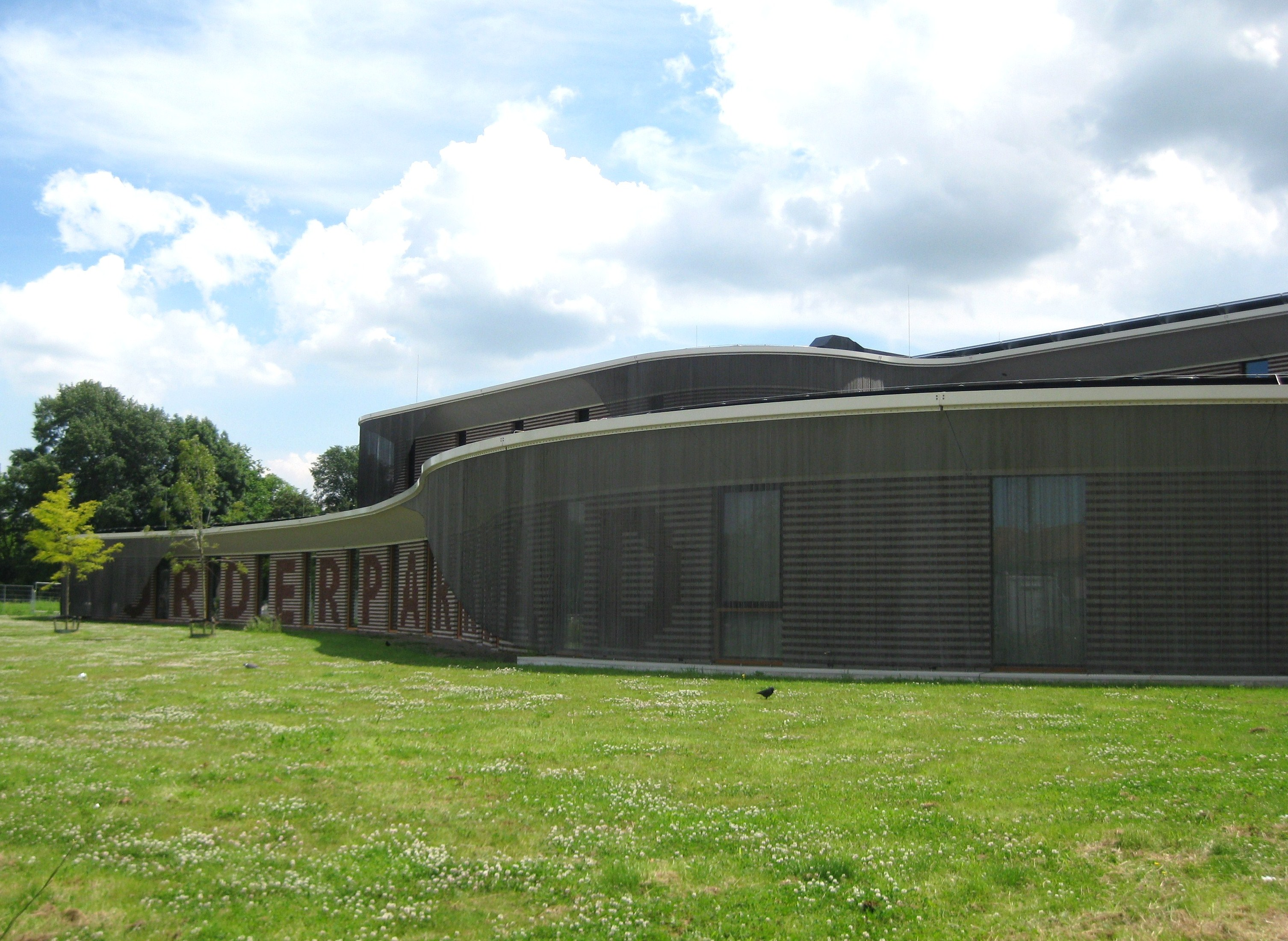 Het Noorderparkbad, zwembad in het Noorderpark in Amsterdam Noord. Winnaar van de Amsterdamse Architectuurprijs 2016.